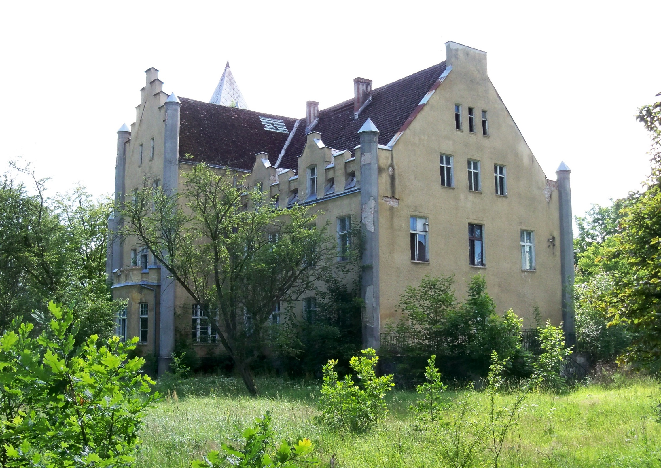 Dobrowo, widok pałacu od strony kościoła